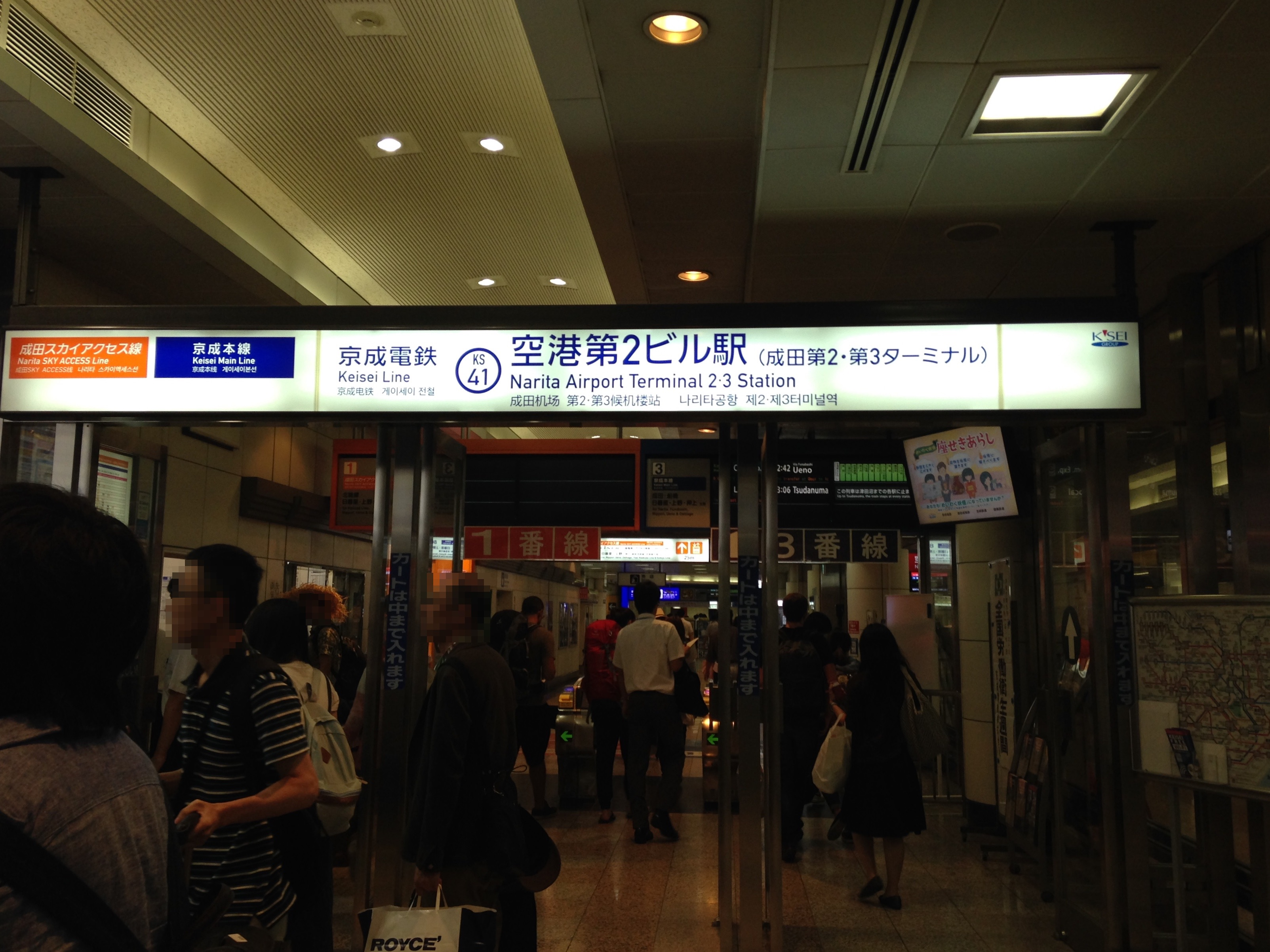 京成空港第2ビル駅